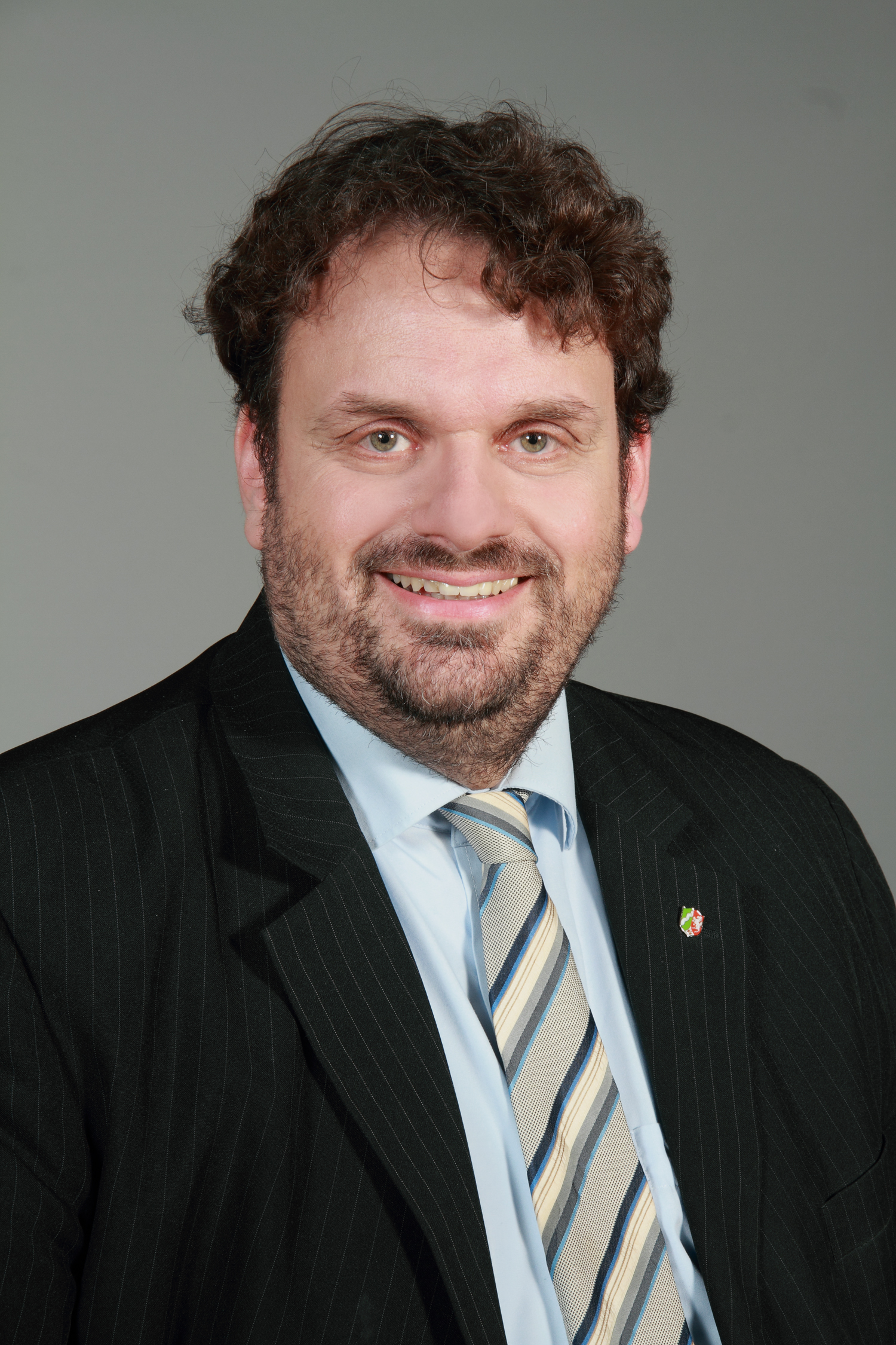 LandtagsabgeordneteR NRW